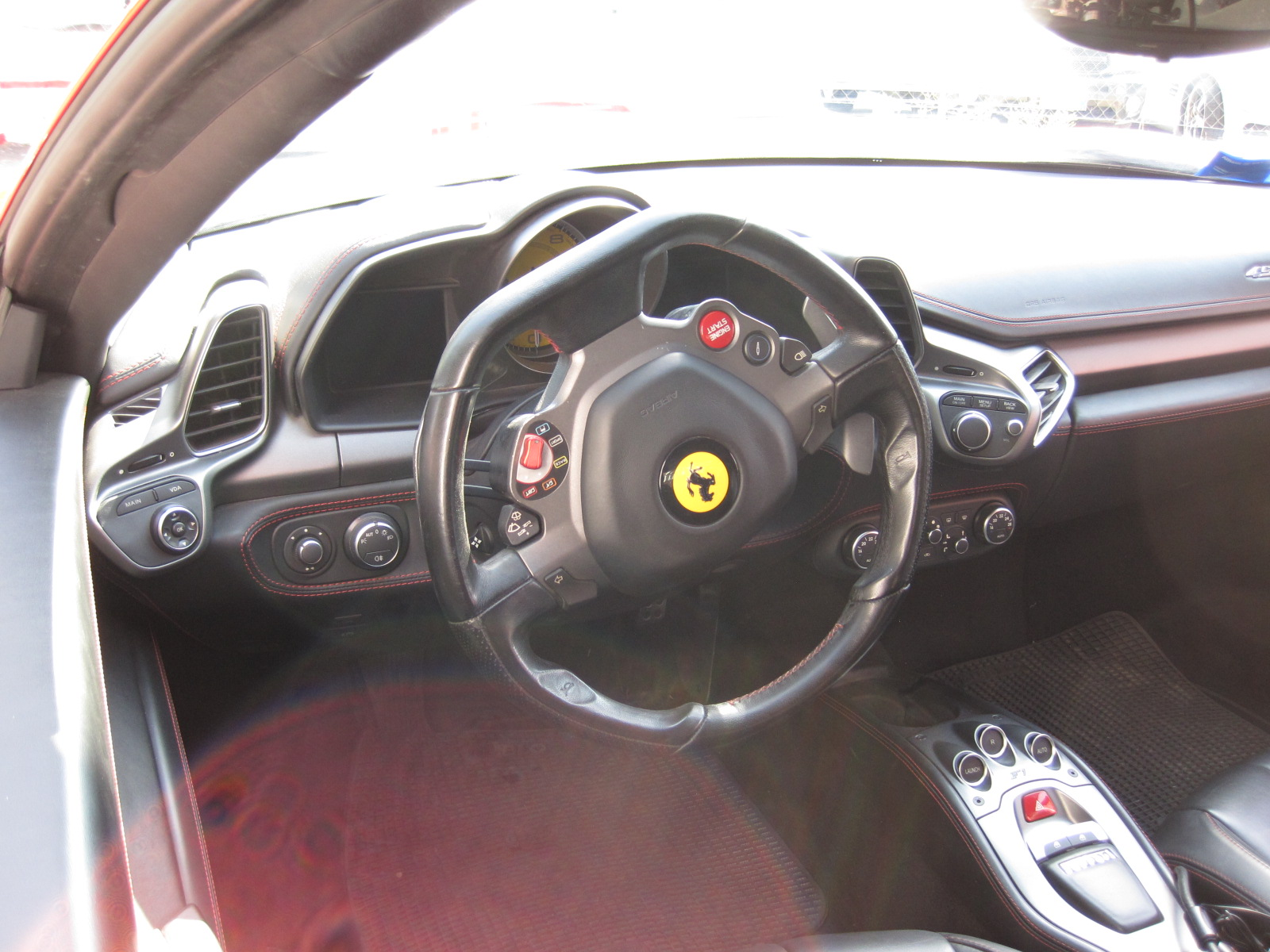 Ferrari shop in Maranello